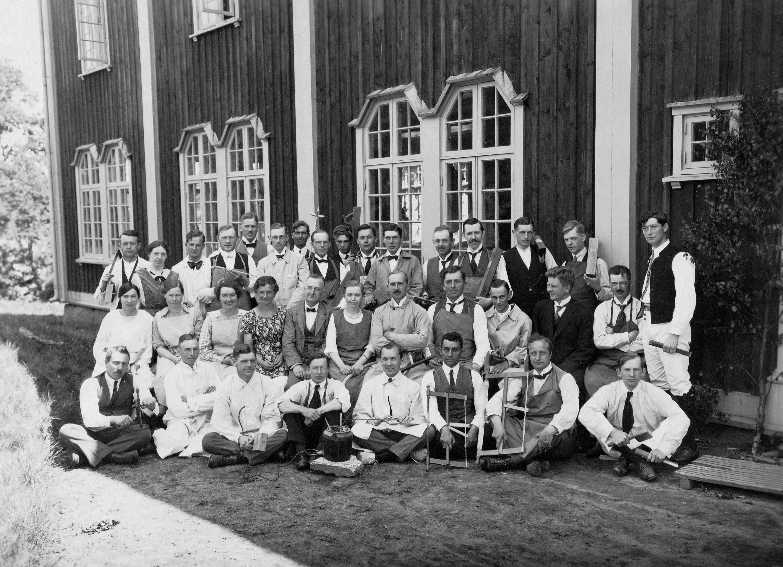 slöjdkurs